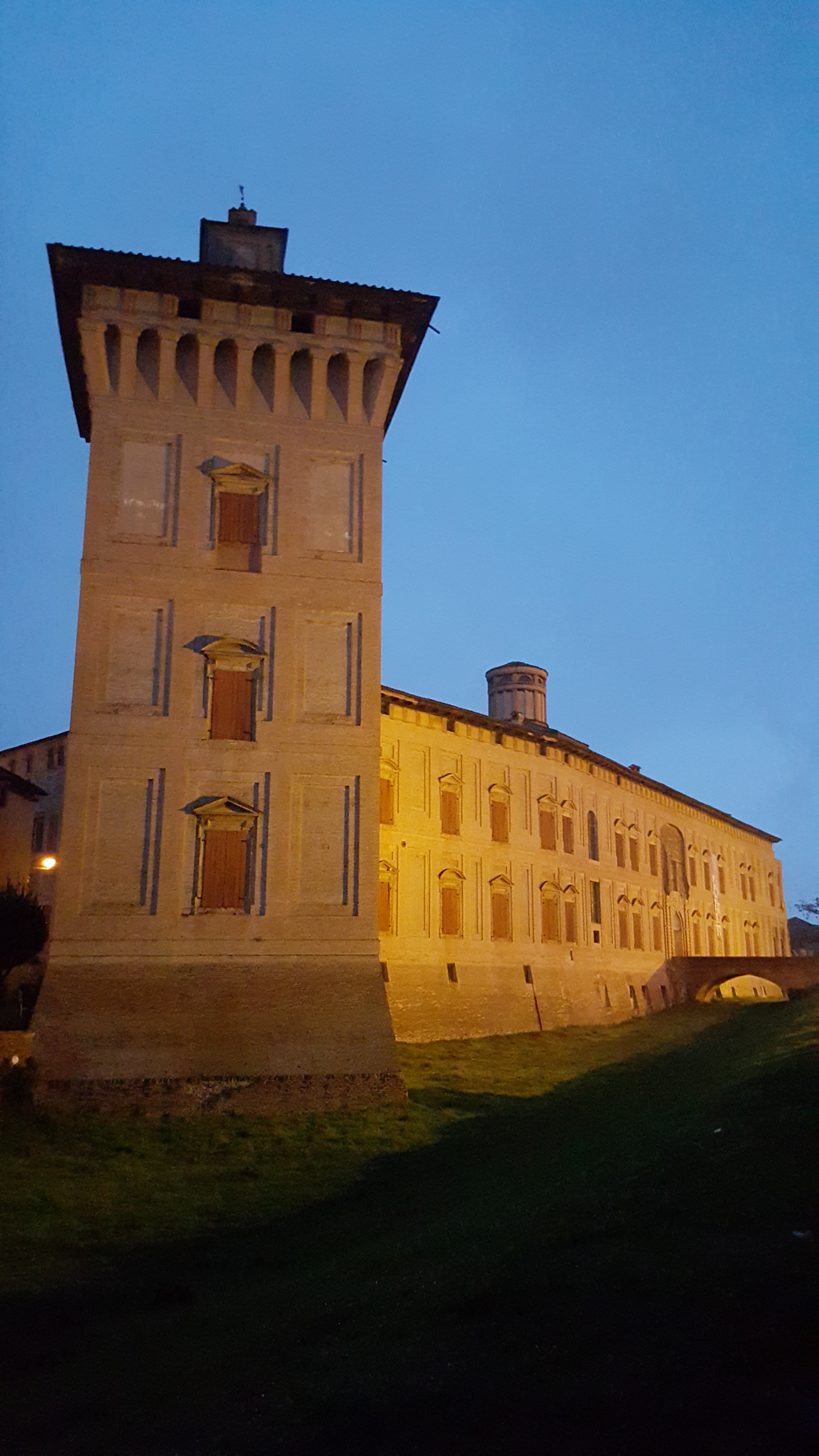 Rocca del Boiardo, facciata This is a photo of a monument which is part of cultural heritage of Italy.